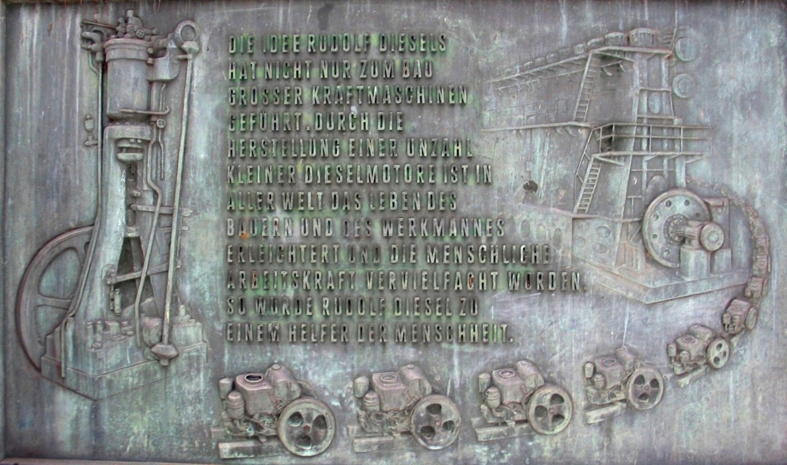 Wittelsbacher Park, Gedenktafel am Rudolf-Diesel-Gedächnishain